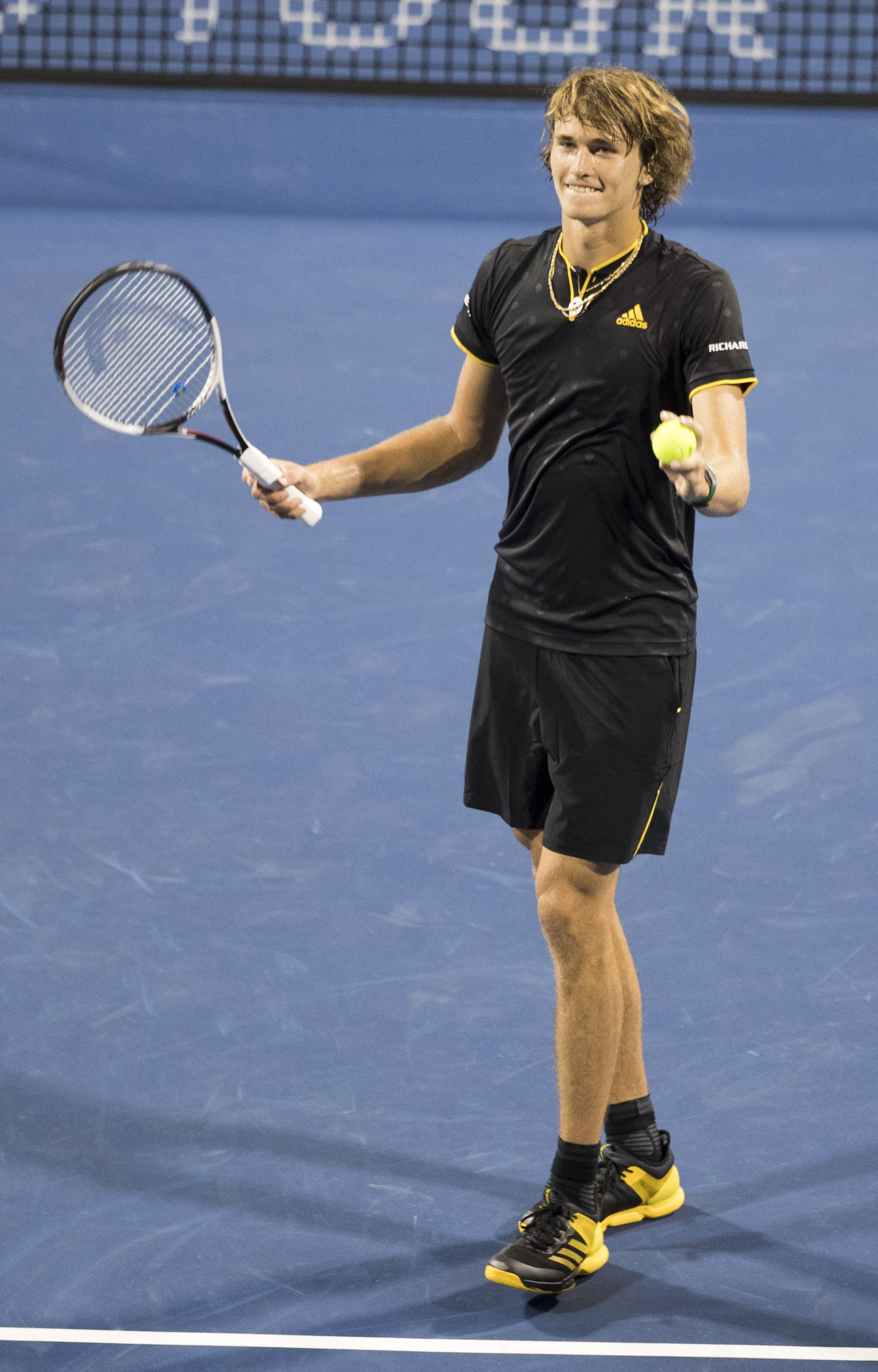 Citi Open Tennis 2017